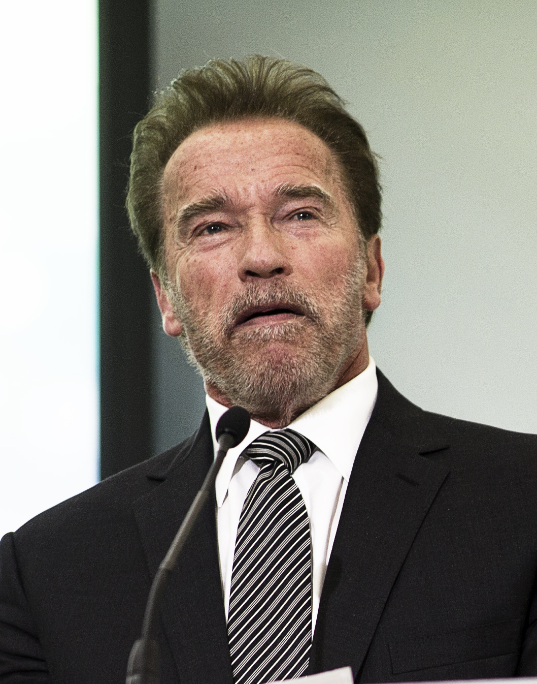 Arnold Schwarzenegger intervient au LPAA (COP21)